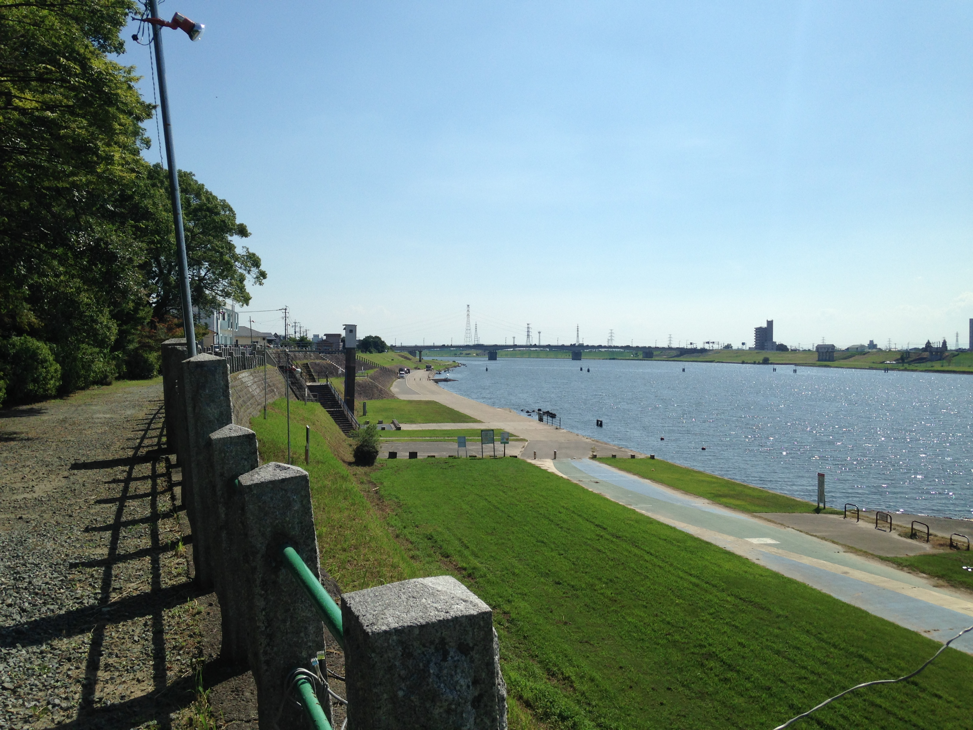 水天宮境内より望む筑後川に架かる豆津橋